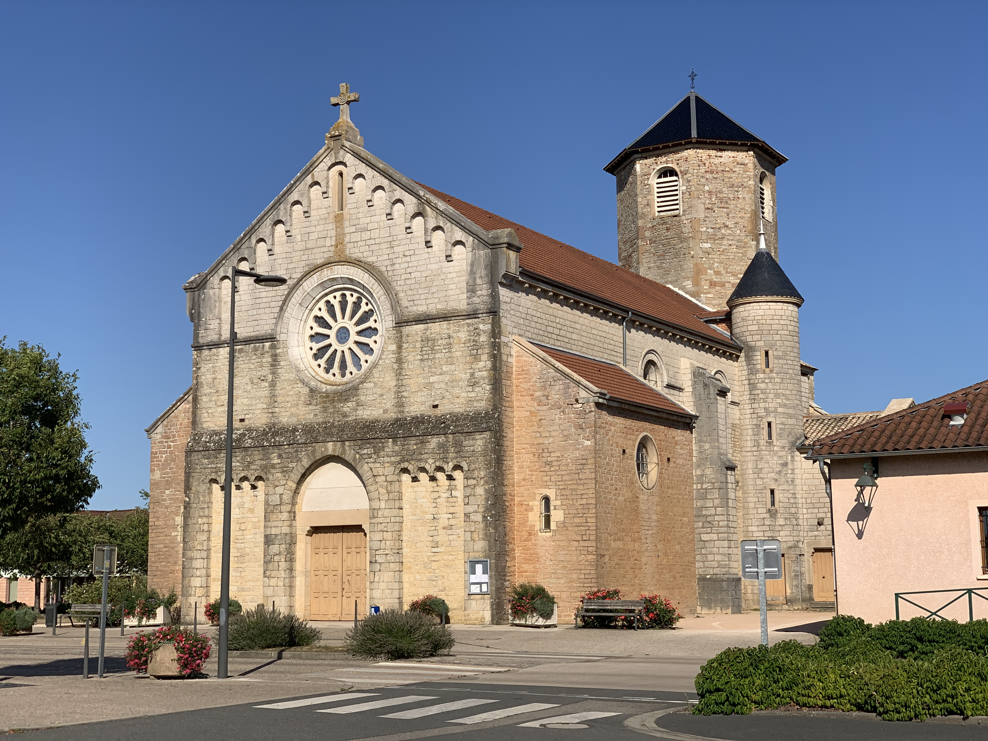 Église Saint-Michel de Bâgé-la-Ville, Bâgé-Dommartin.